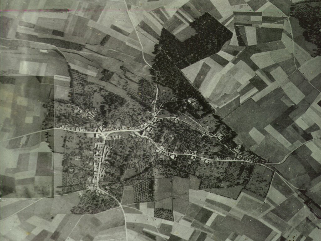 Photographie aérienne d'Aqueux en 1947, avant le remembrement